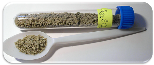 Křemičitan stříbrný - Ag₂SiO₃